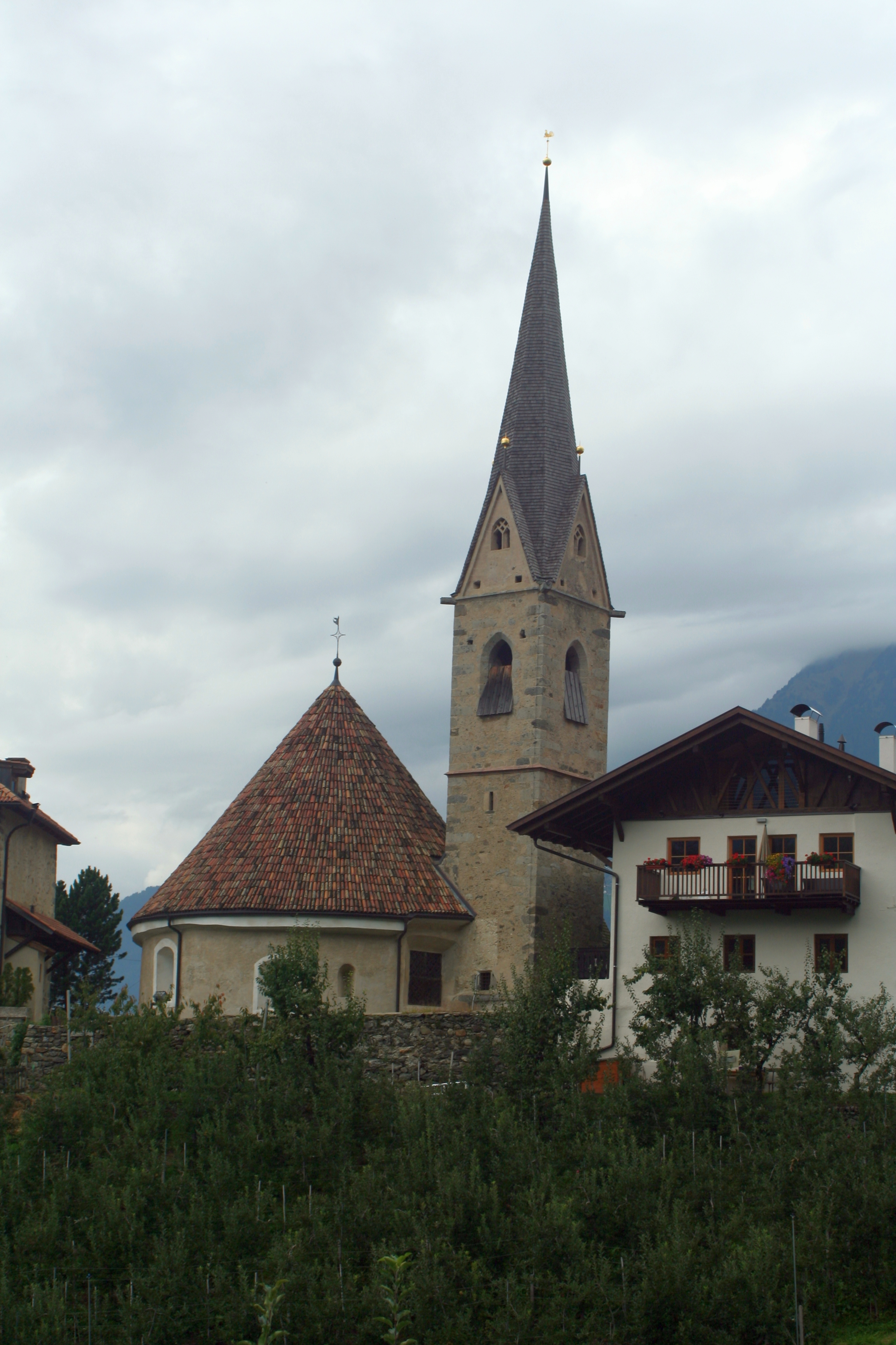 St. Georg in Oberdorf